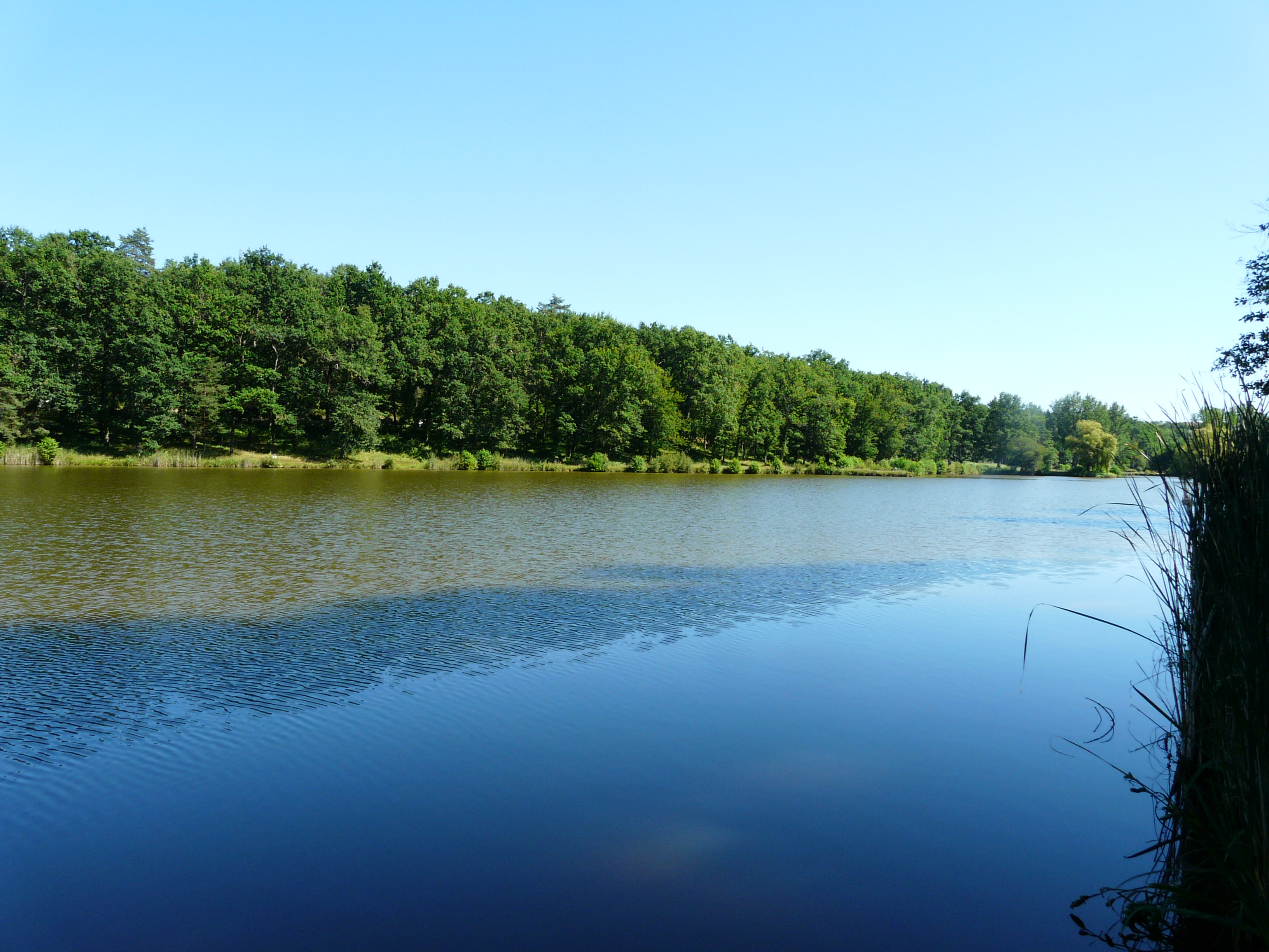 L'étang du Coucou, Hautefort, Dordogne, France. La rive opposée se trouve sur la commune de Nailhac.